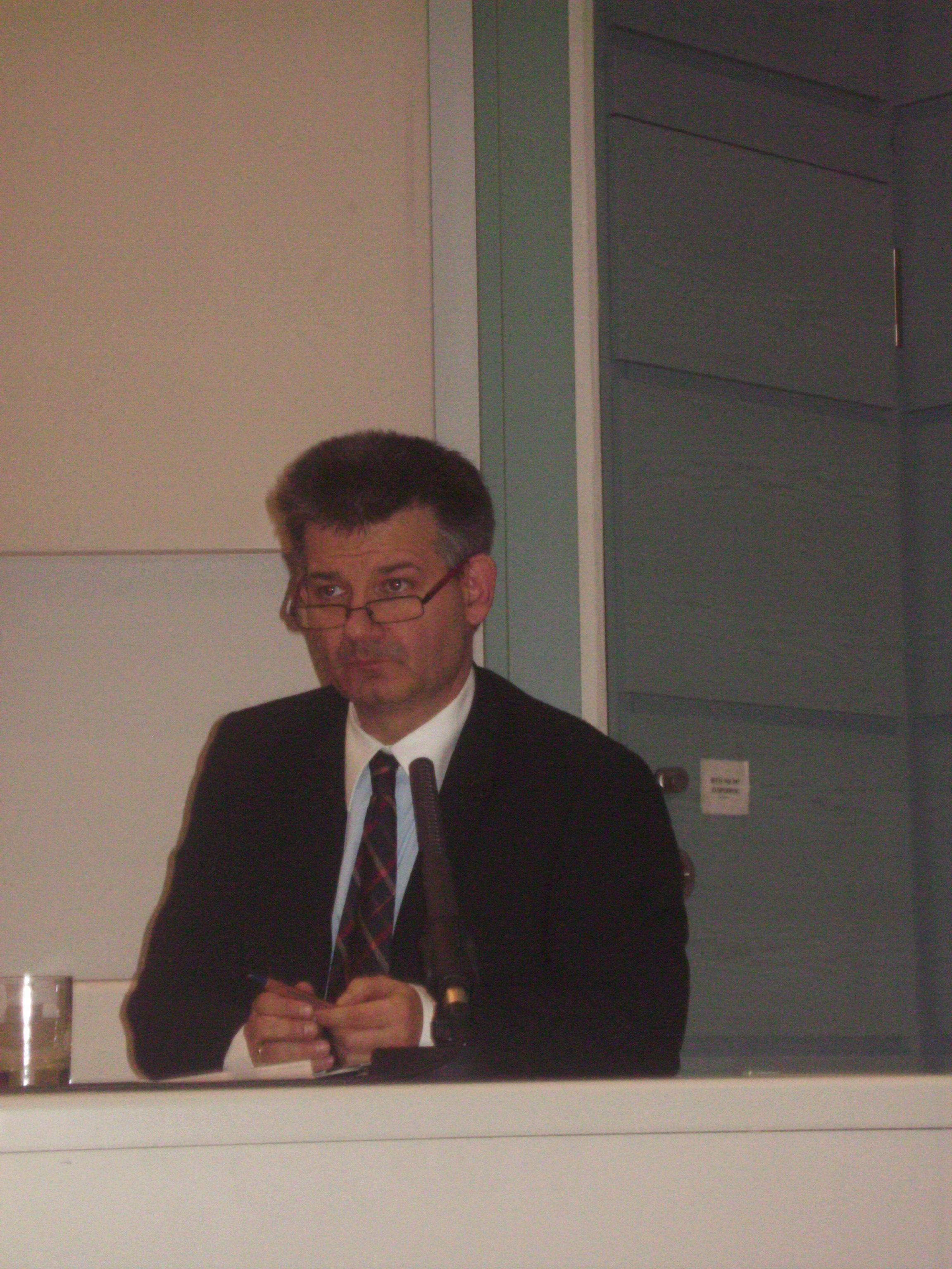 Johannes Wallacher an der Hochschule für Philosophie in München